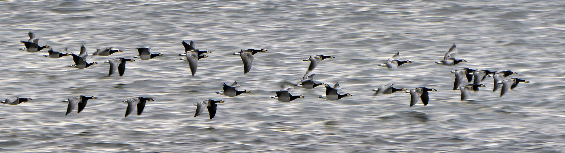 Vitkindad gås sträckar väst. Världens ände Ystad 7 okt 2017.